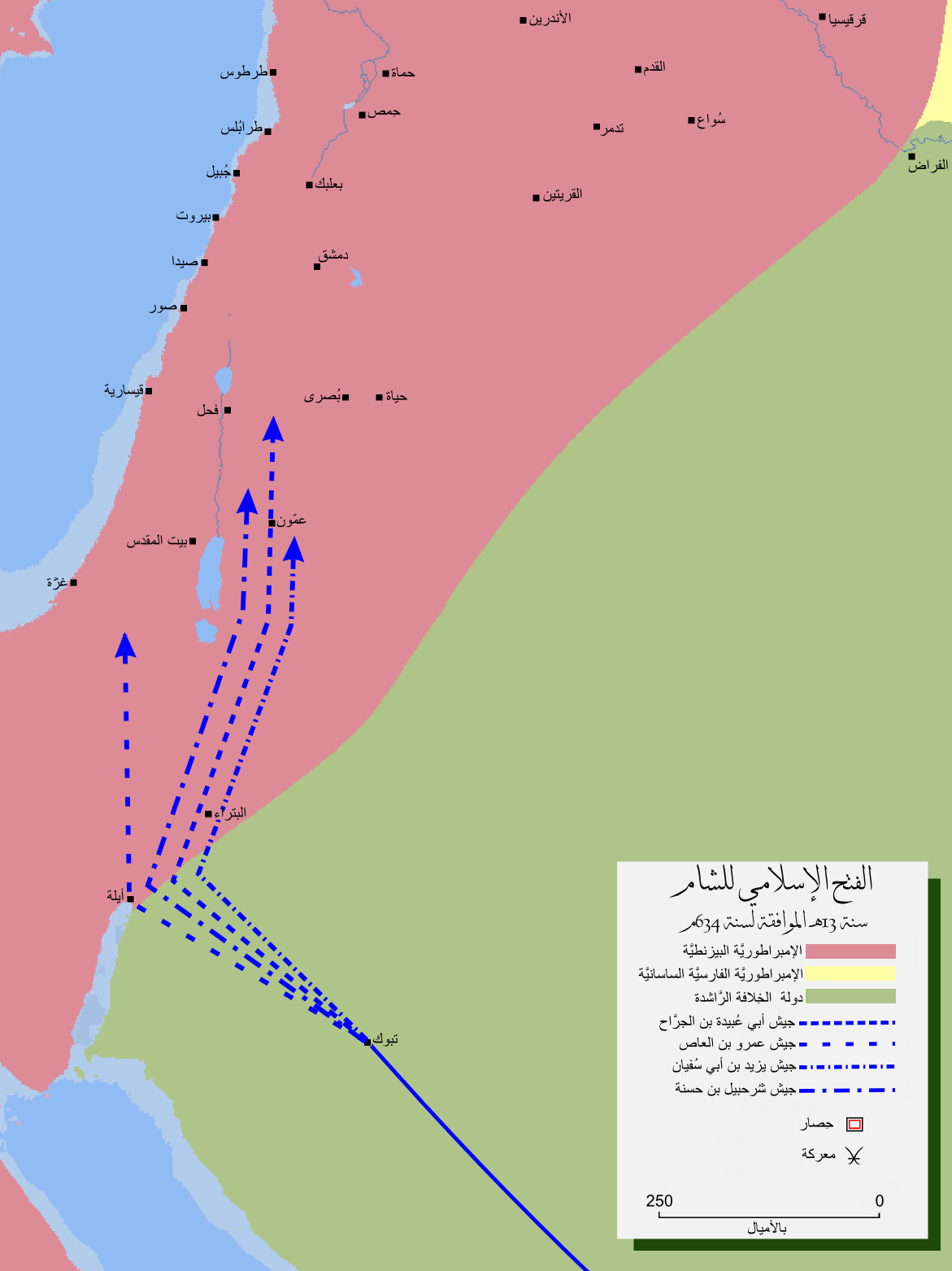 خارطة تُظهرُ مسار الجُيوش الإسلاميَّة المُتجهة لِفتح الشَّام زمن الخِلافة الرَّاشدة.